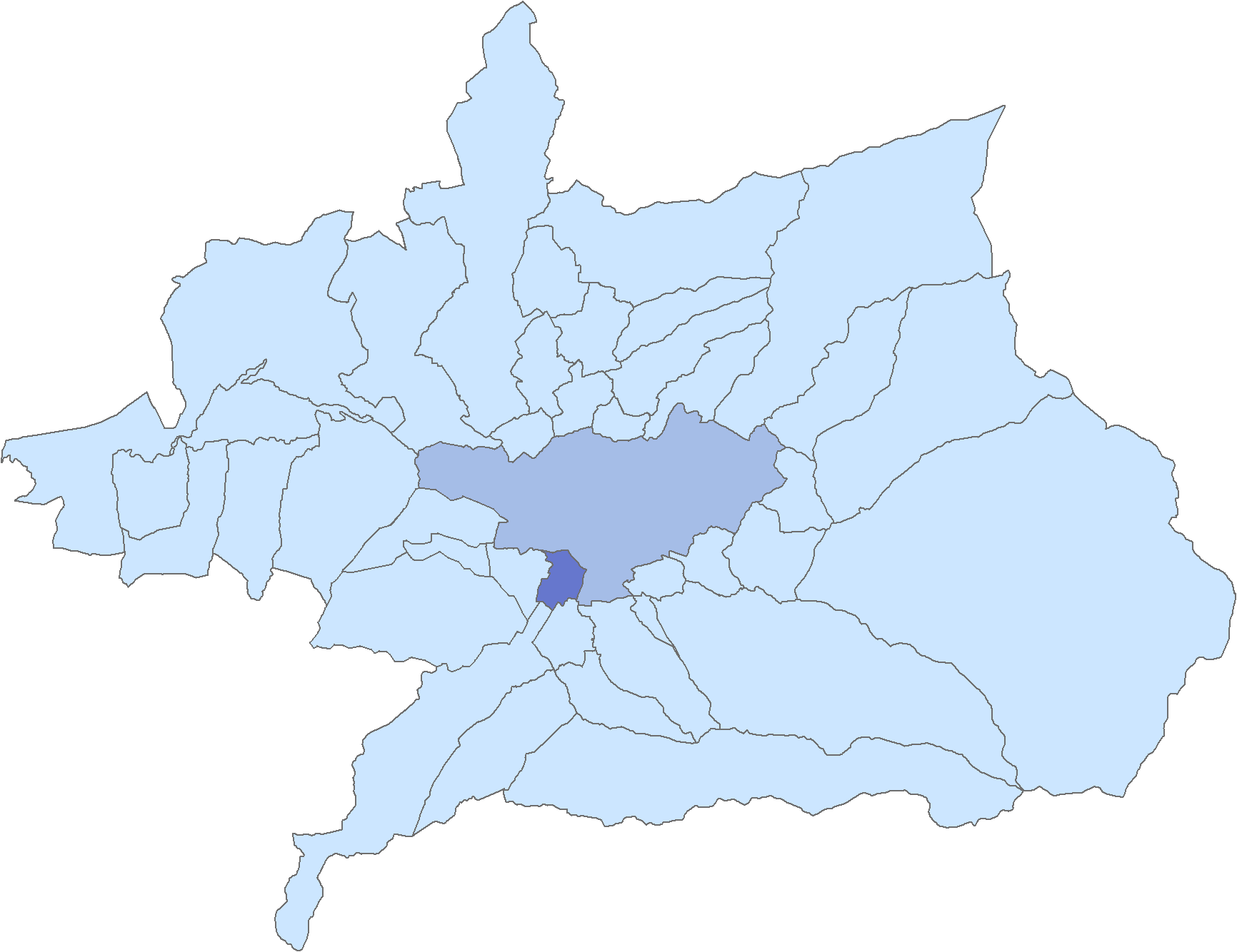 Situación del municipio de Armilla respecto a la comarca de la Vega de Granada, en España.